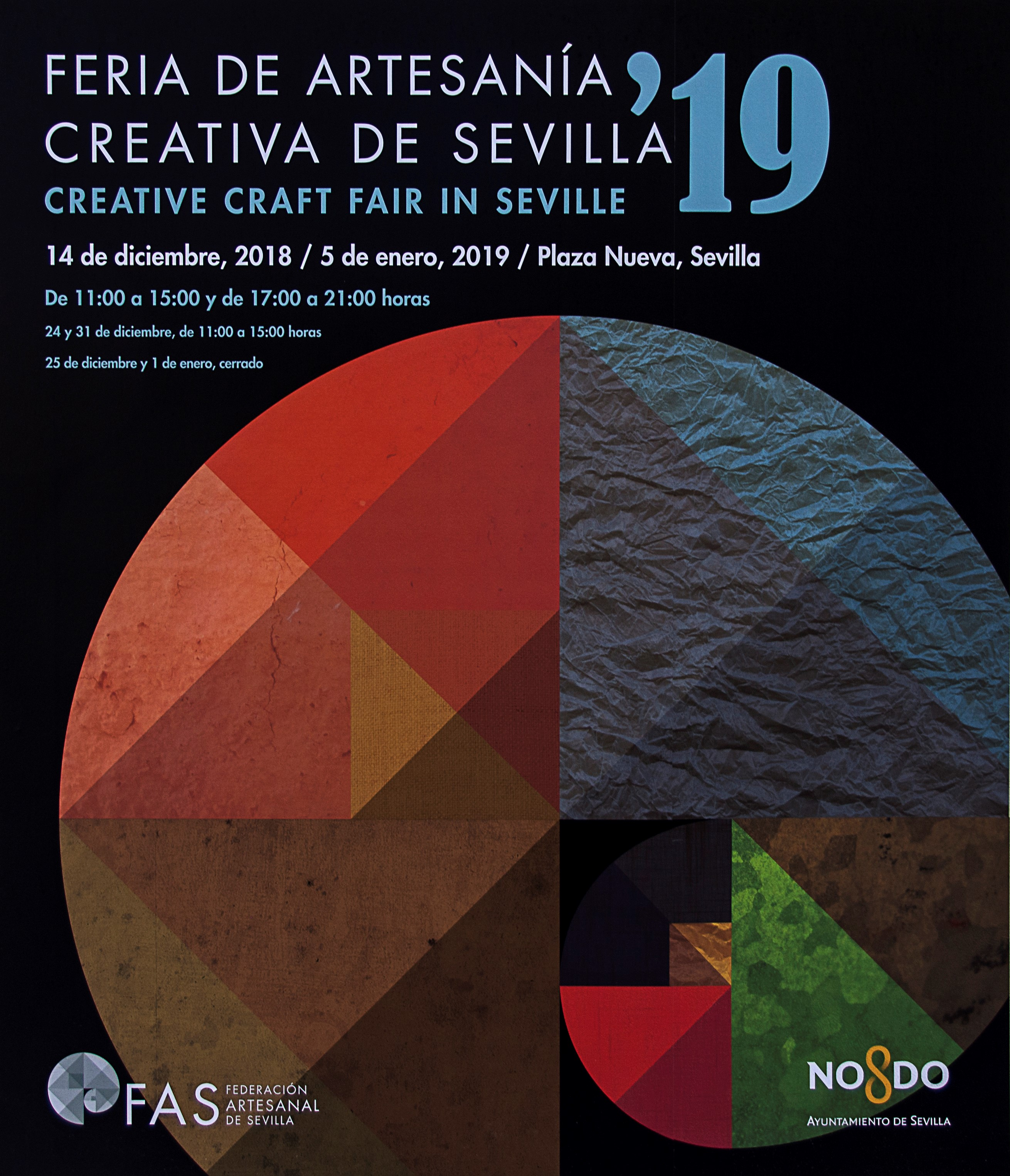 Cartel anunciador de la feria de artesania creativa de Sevilla 2018